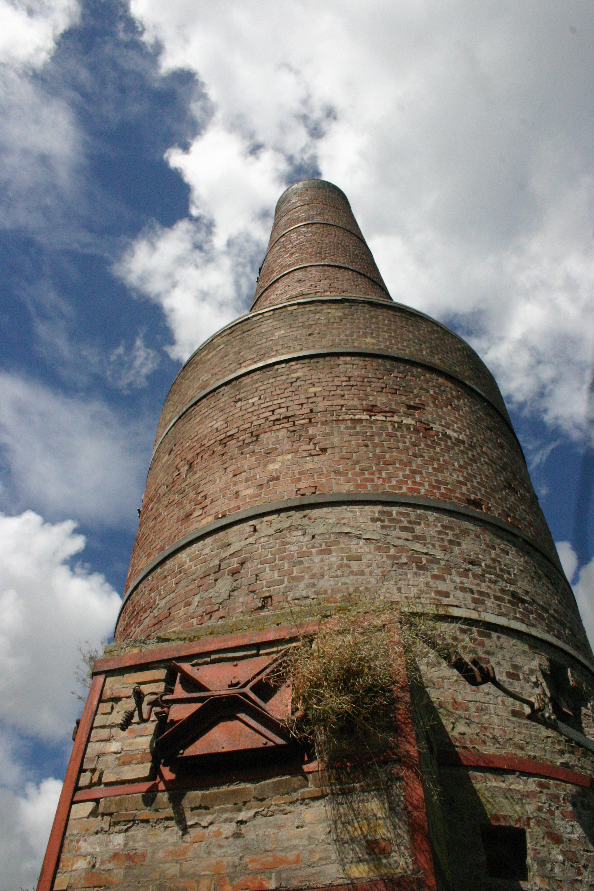 Den ene af de to tørreovne i kalkbruddet